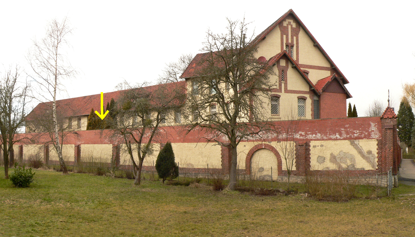 Festes Haus Göttingen mit Klingebiel Zelle, die 9. Zelle von links der insgesamt 16 Zellen im Obergeschoss, ungefähre Position mit gelbem Pfeil markiert